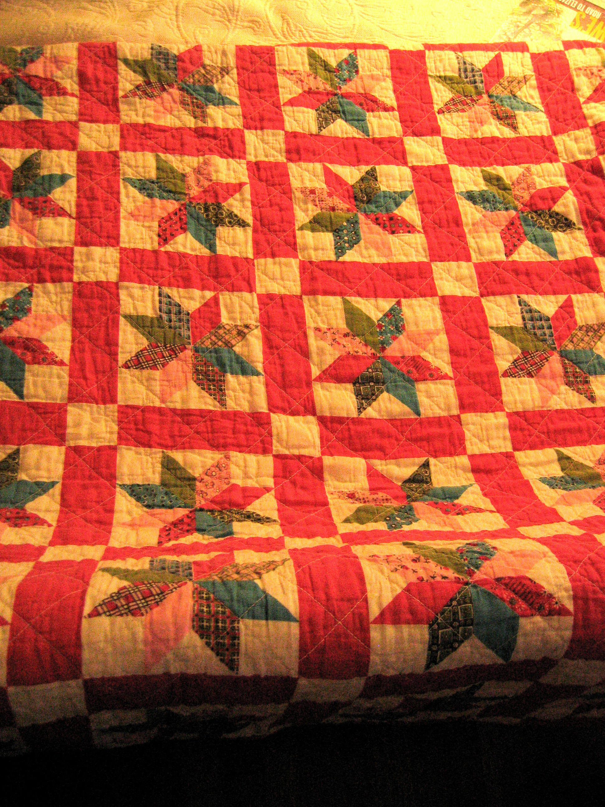 my new (new to me) antique quilt! i lurve it.